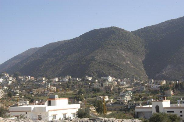 Village d'Arabsalim, au Sud-liban.